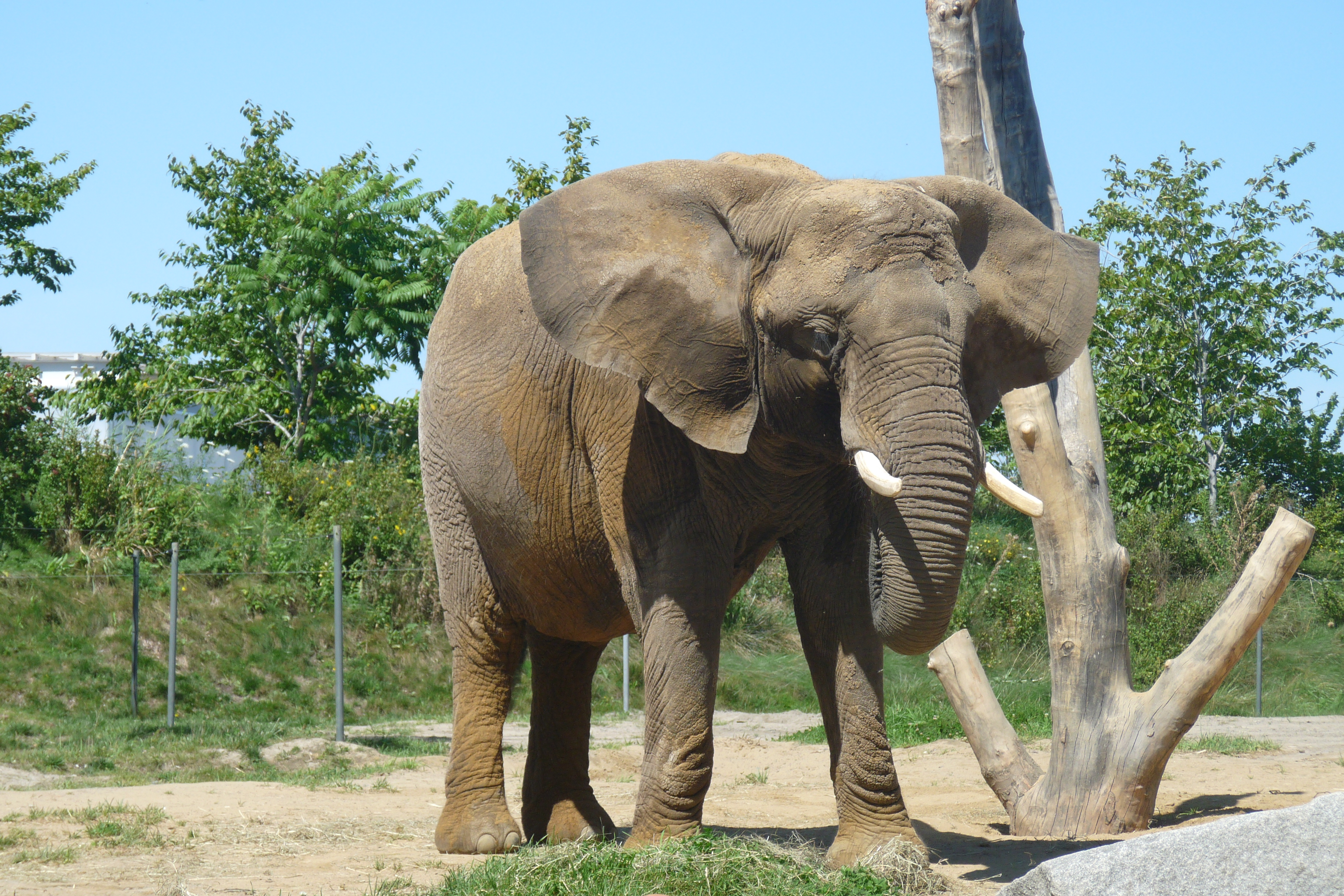 Éléphant africain au zoo de Granby en 2010